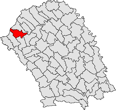 Categorie:Hărţi ale judeţului Botoşani